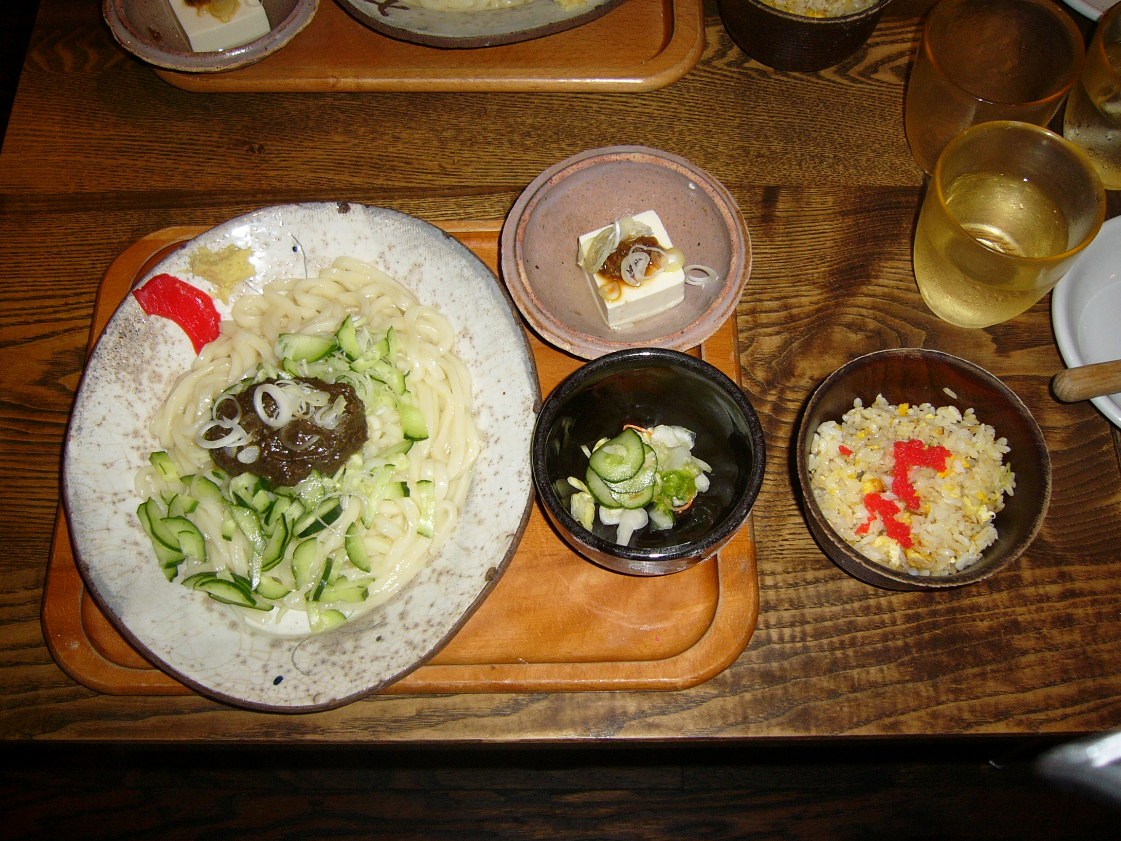 Morioka Jajamen（盛岡じゃじゃ麺）